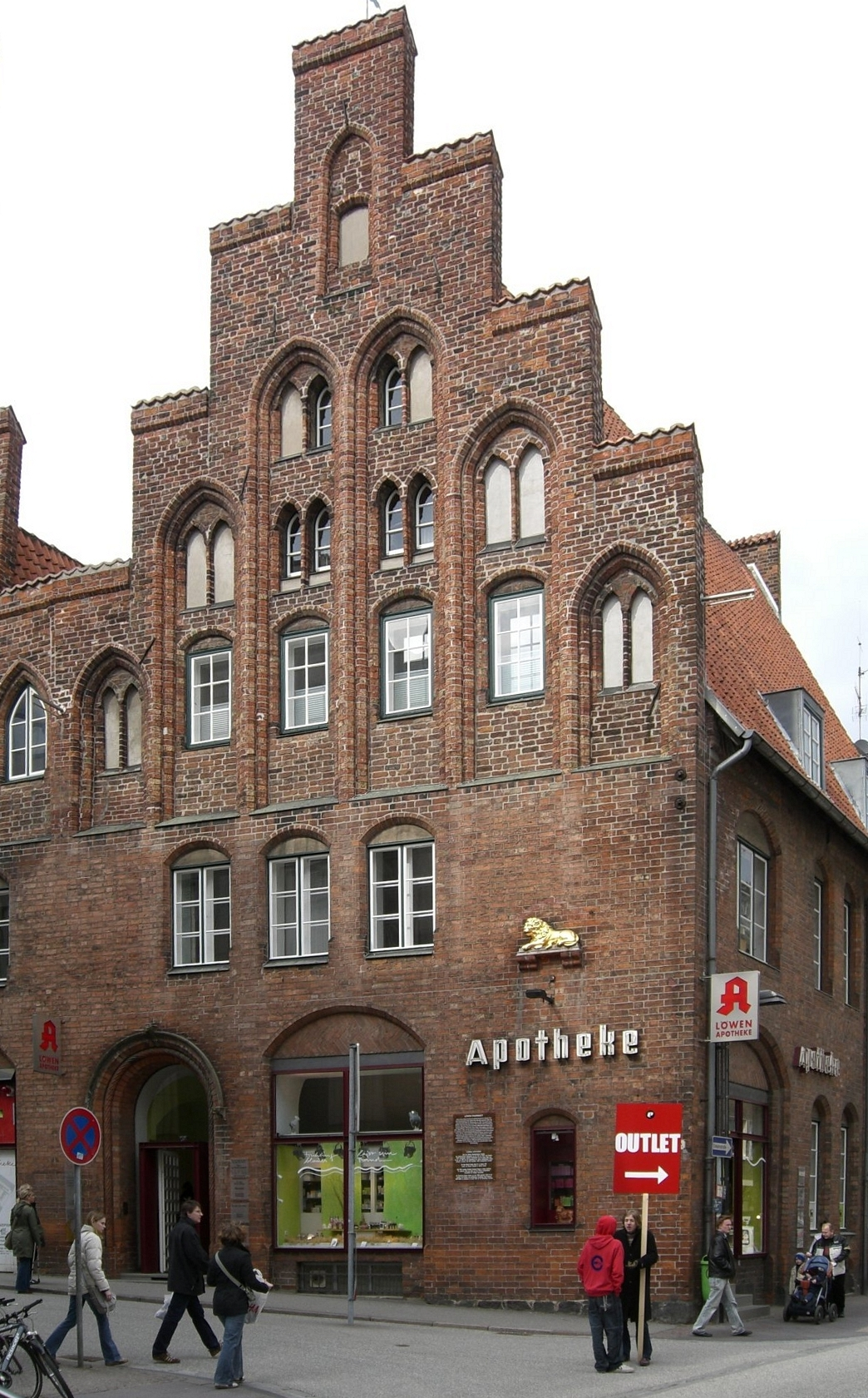 Löwenapotheke zu Lübeck (eigene Aufnahme)